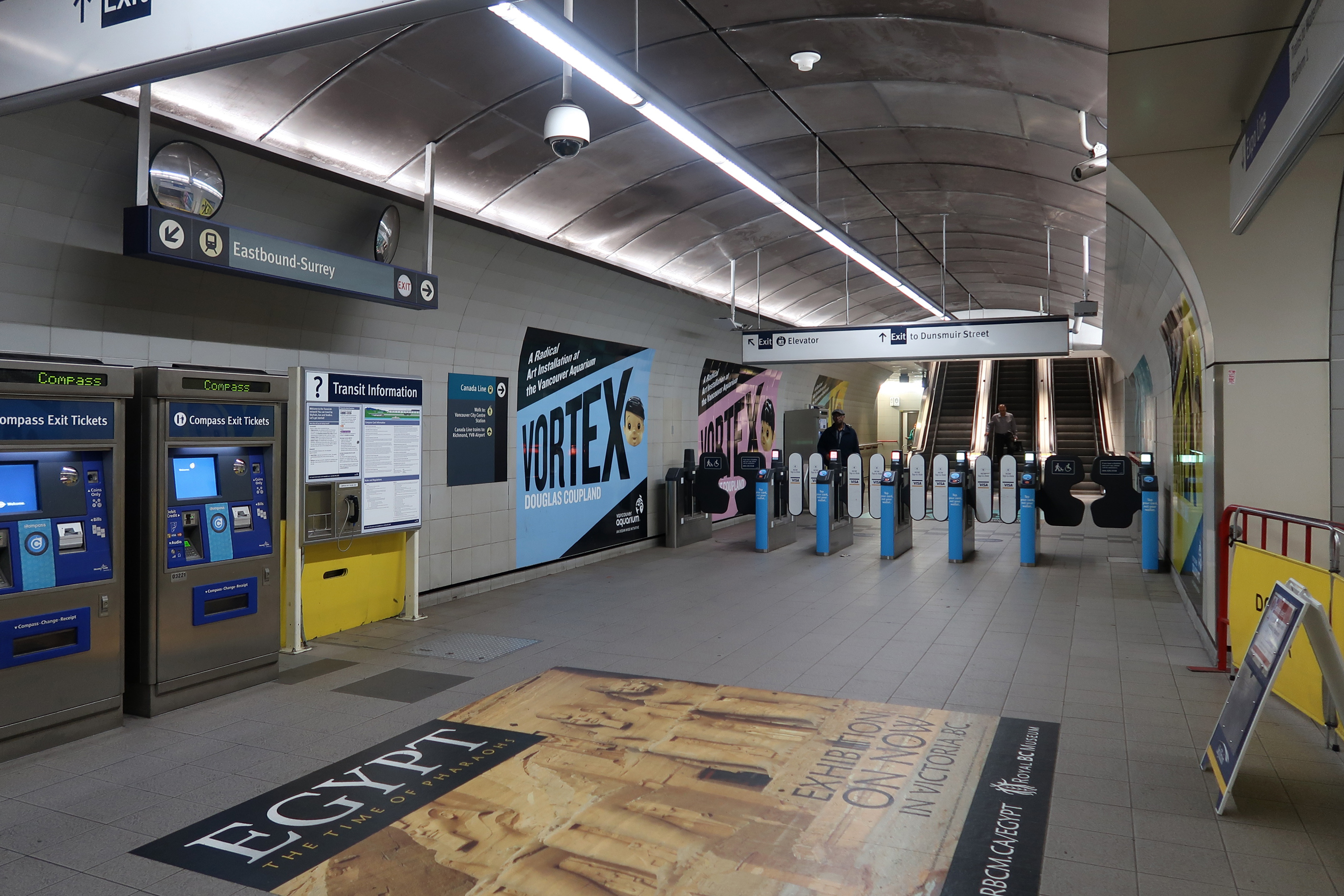 Granville station access